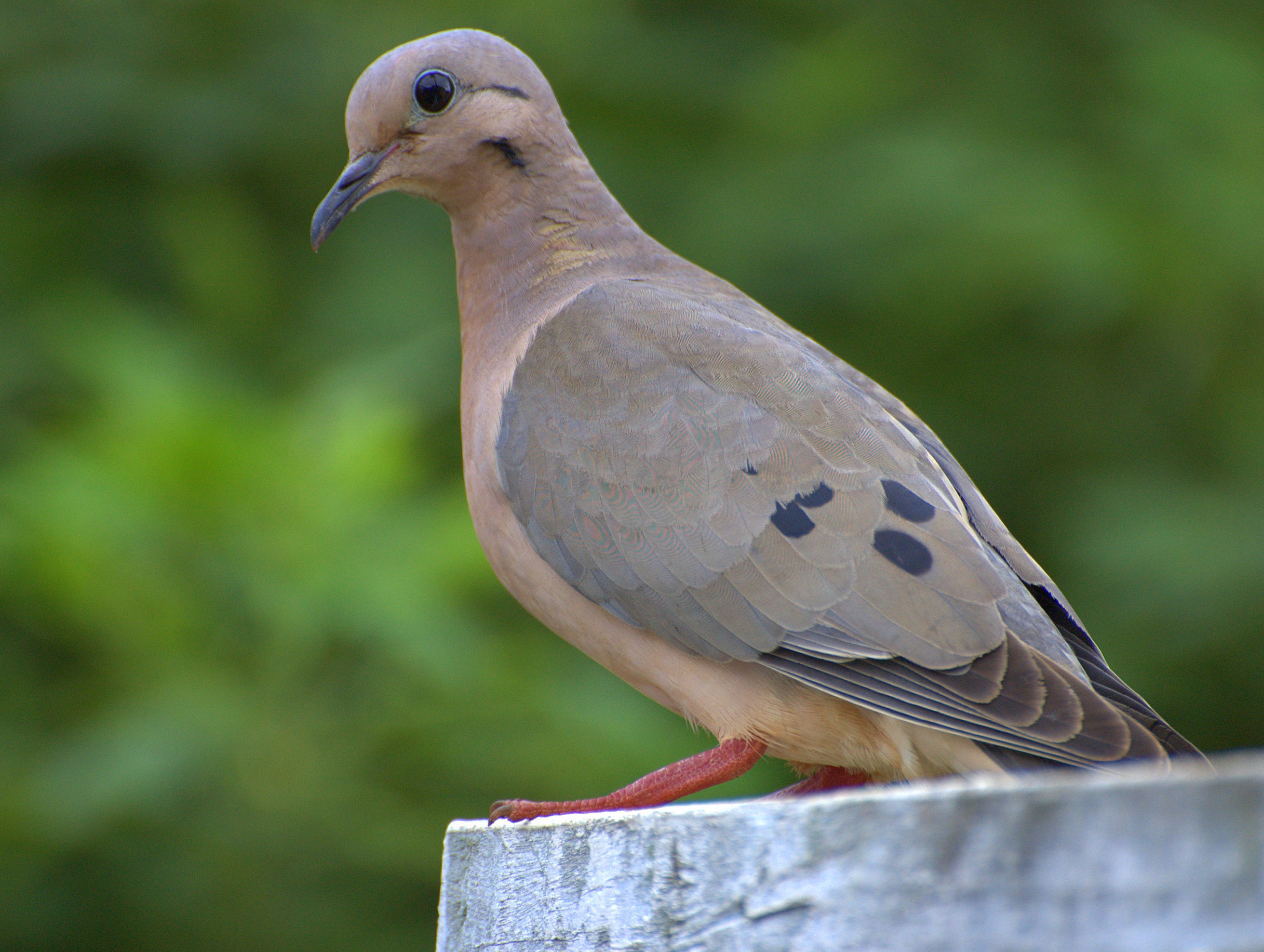 No quintal da casa dos meus pais na cidade de Piraju-SP